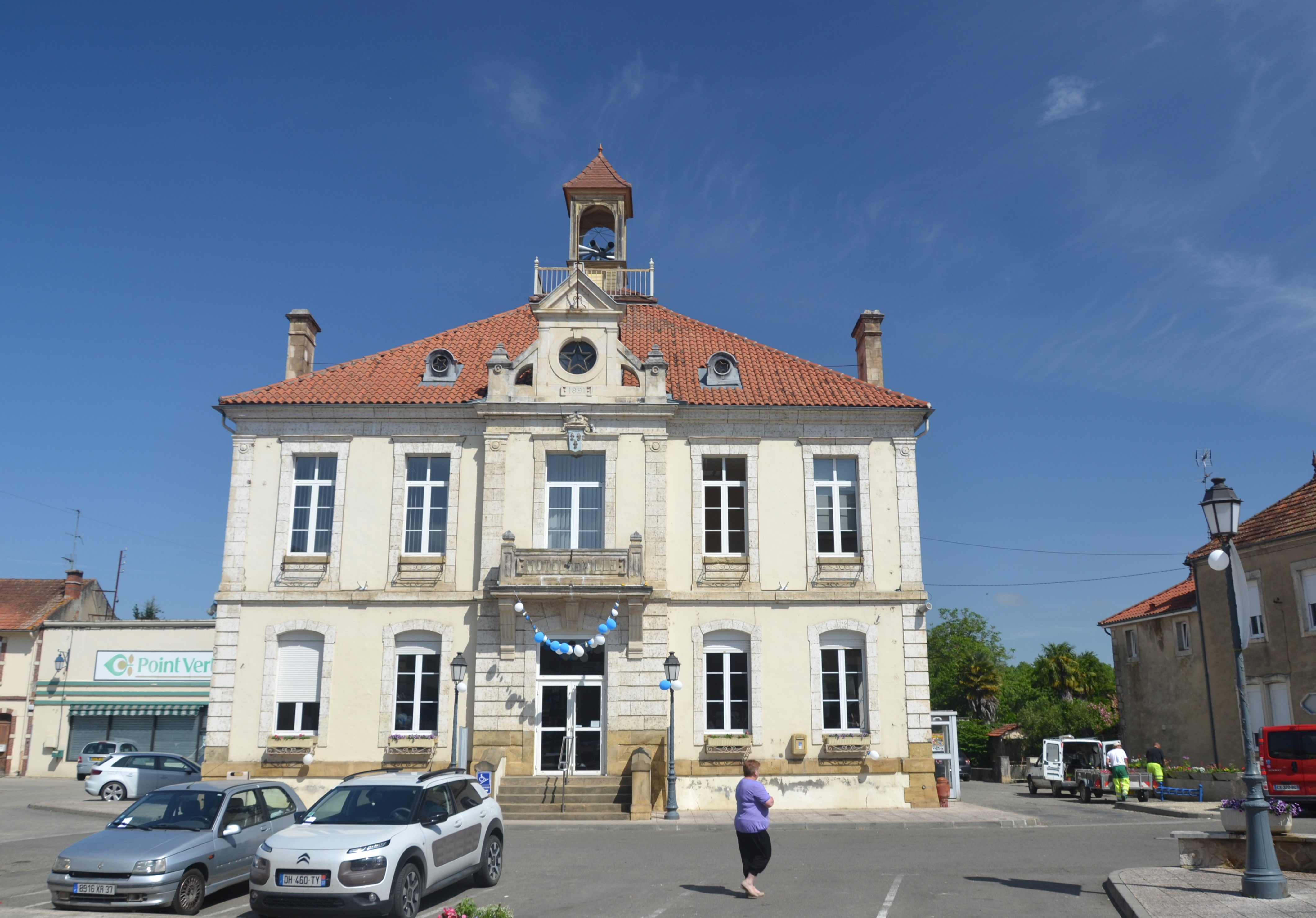 Mairie de Riscle